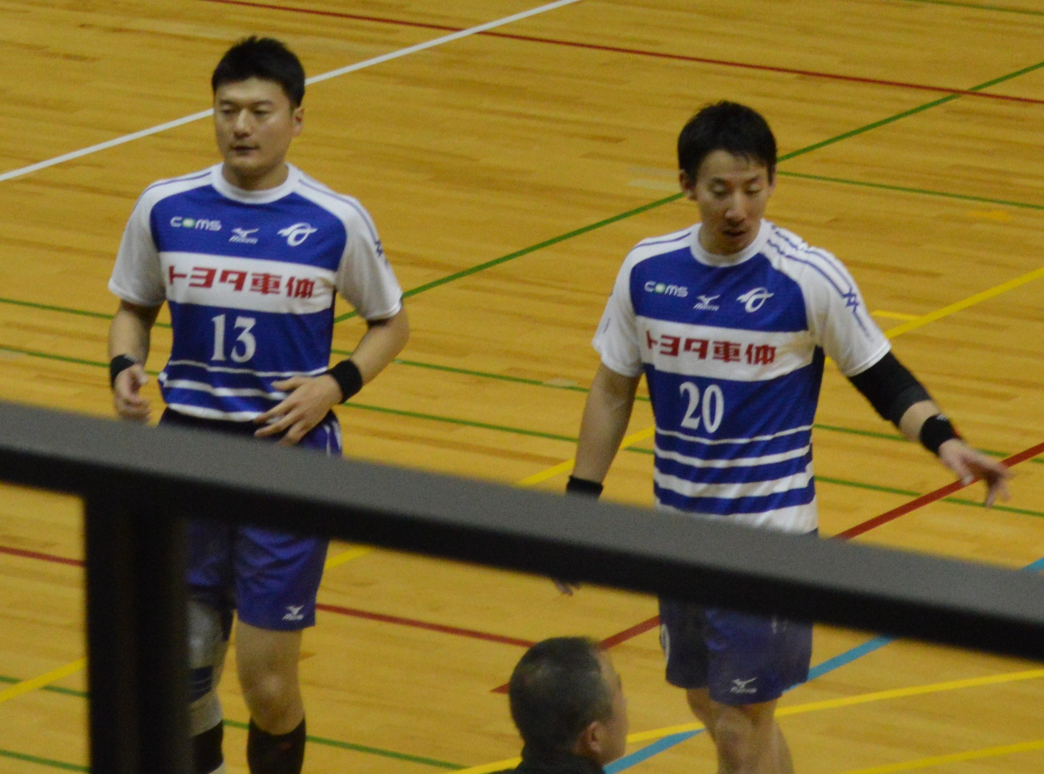 日本ハンドボールリーグ2015-16 トヨタ車体ブレイブキングス